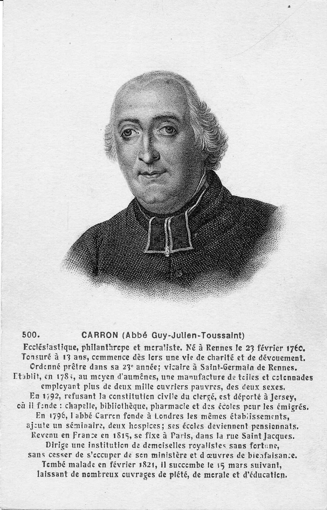 Portrait de l'abbé Carron (1760-1821), religieux. Carte postale F. Château, conservée aux Archives de Rennes, 100 Fi 470